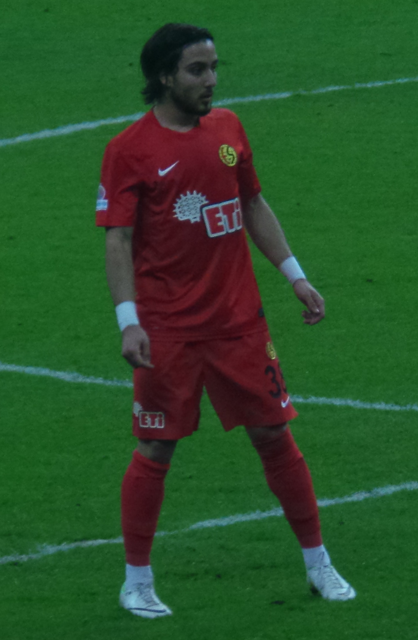 Tarık Çamdal